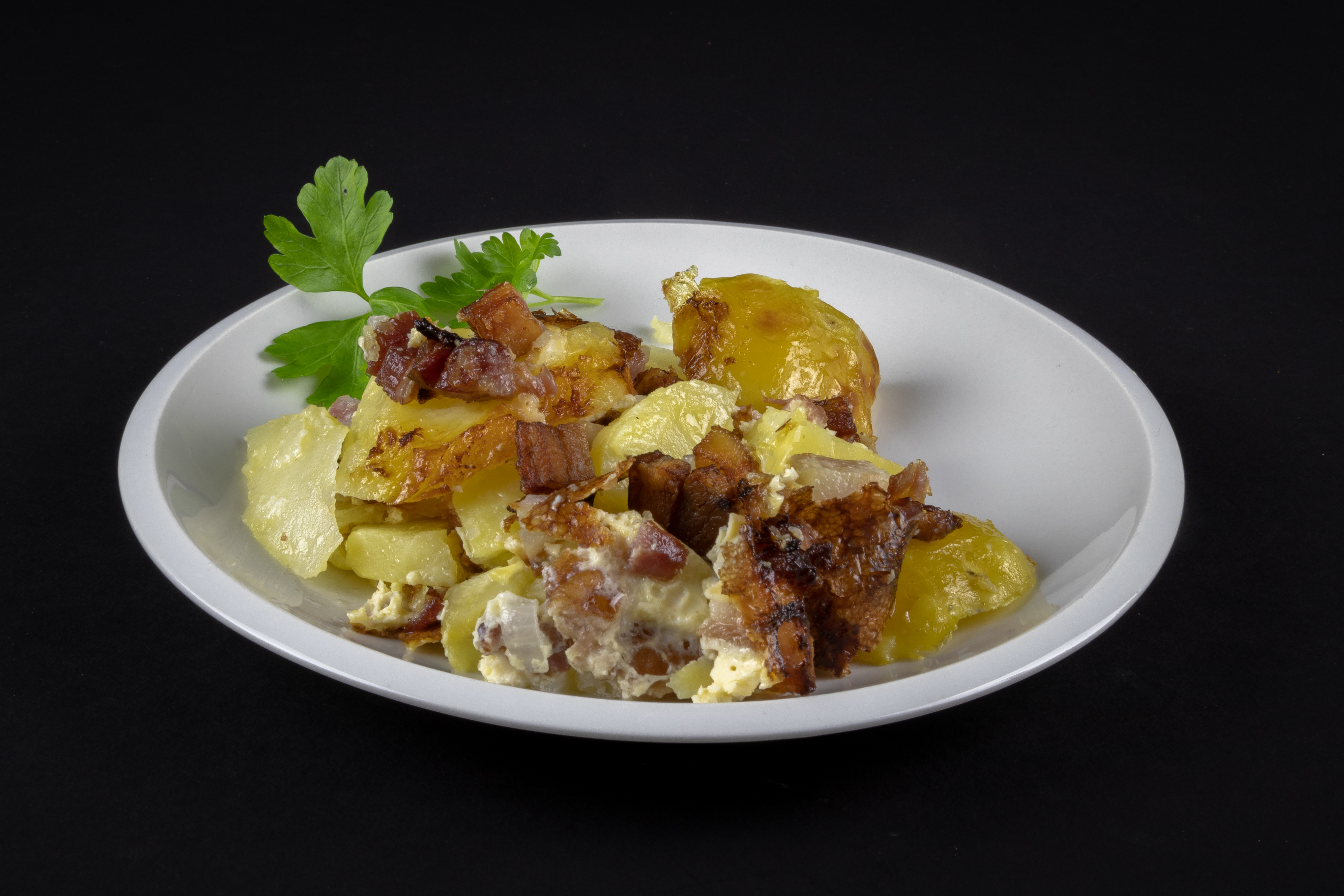 Schinkenbegräbnis - Kartoffelauflauf, angerichtet